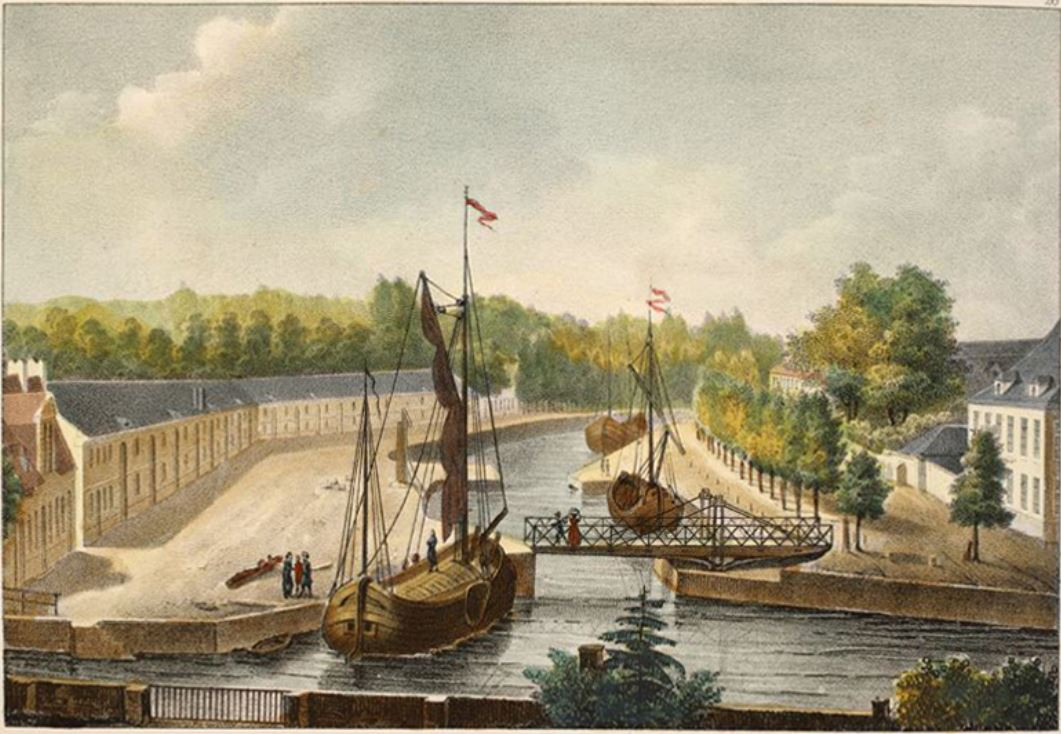 66. Promenade de la coupure, à Gand.